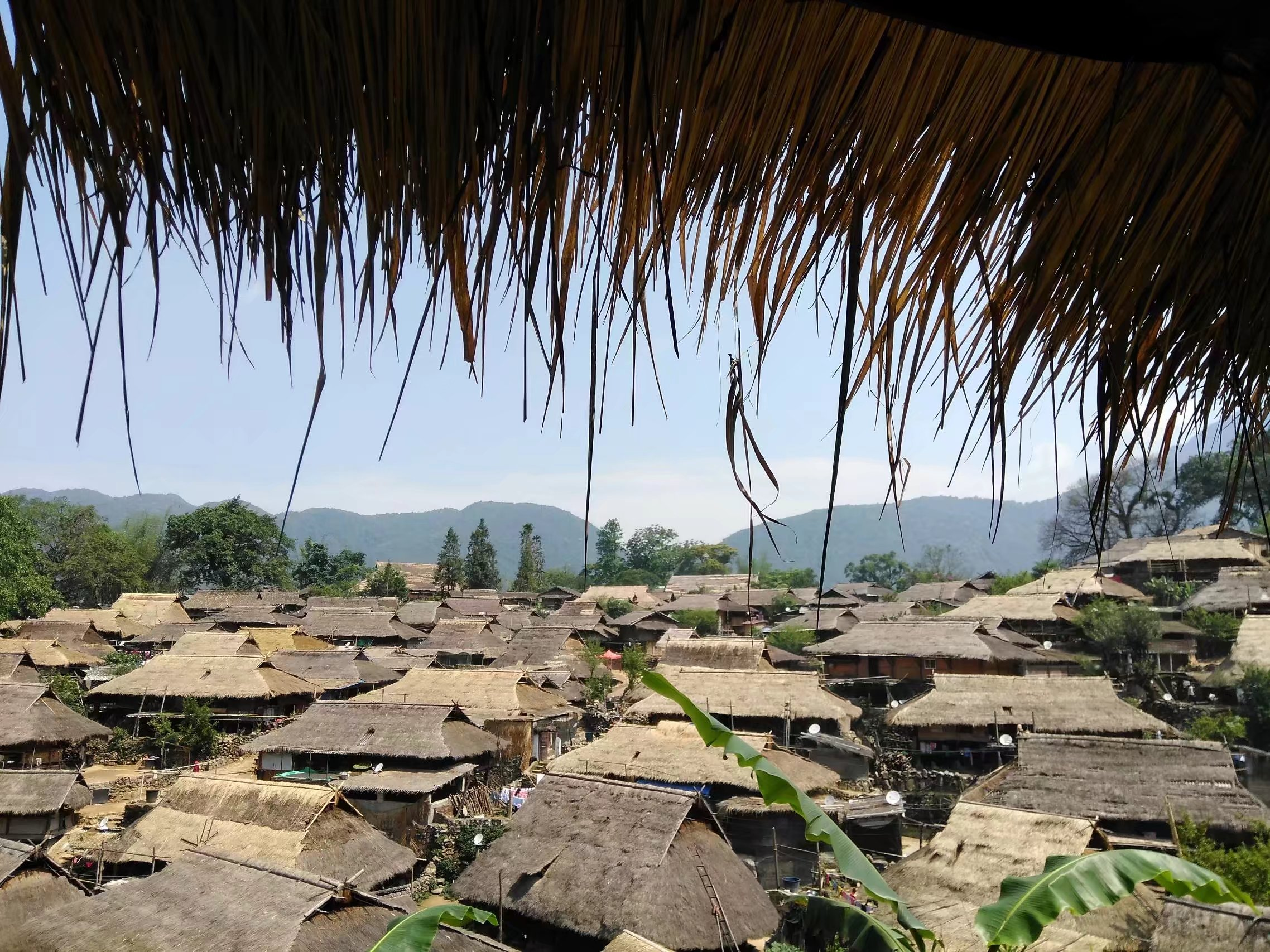 沧源佤族自治县勐角傣族彝族拉祜族乡翁丁村